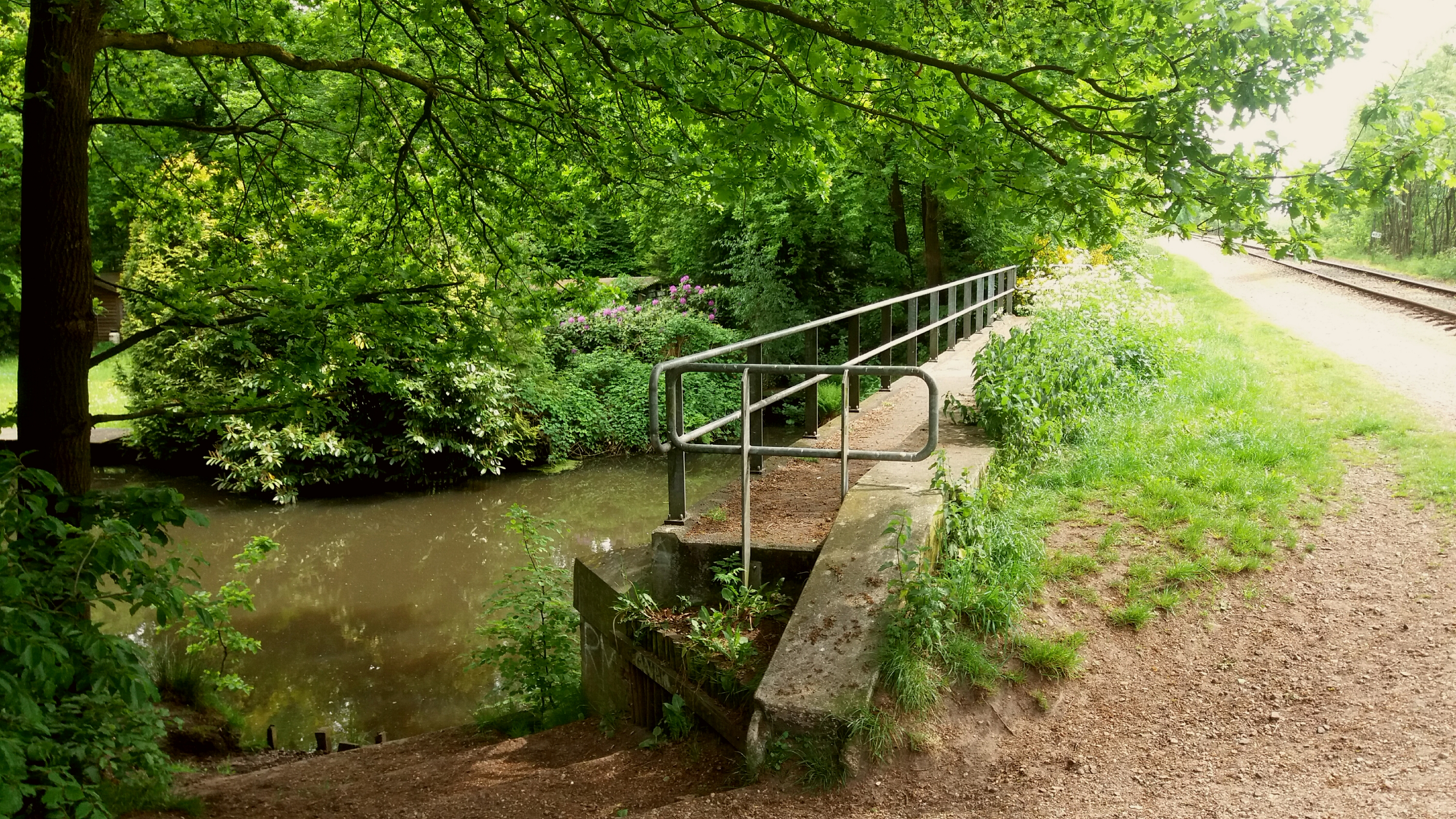 spoorbrug over de heiligenbergerbeek